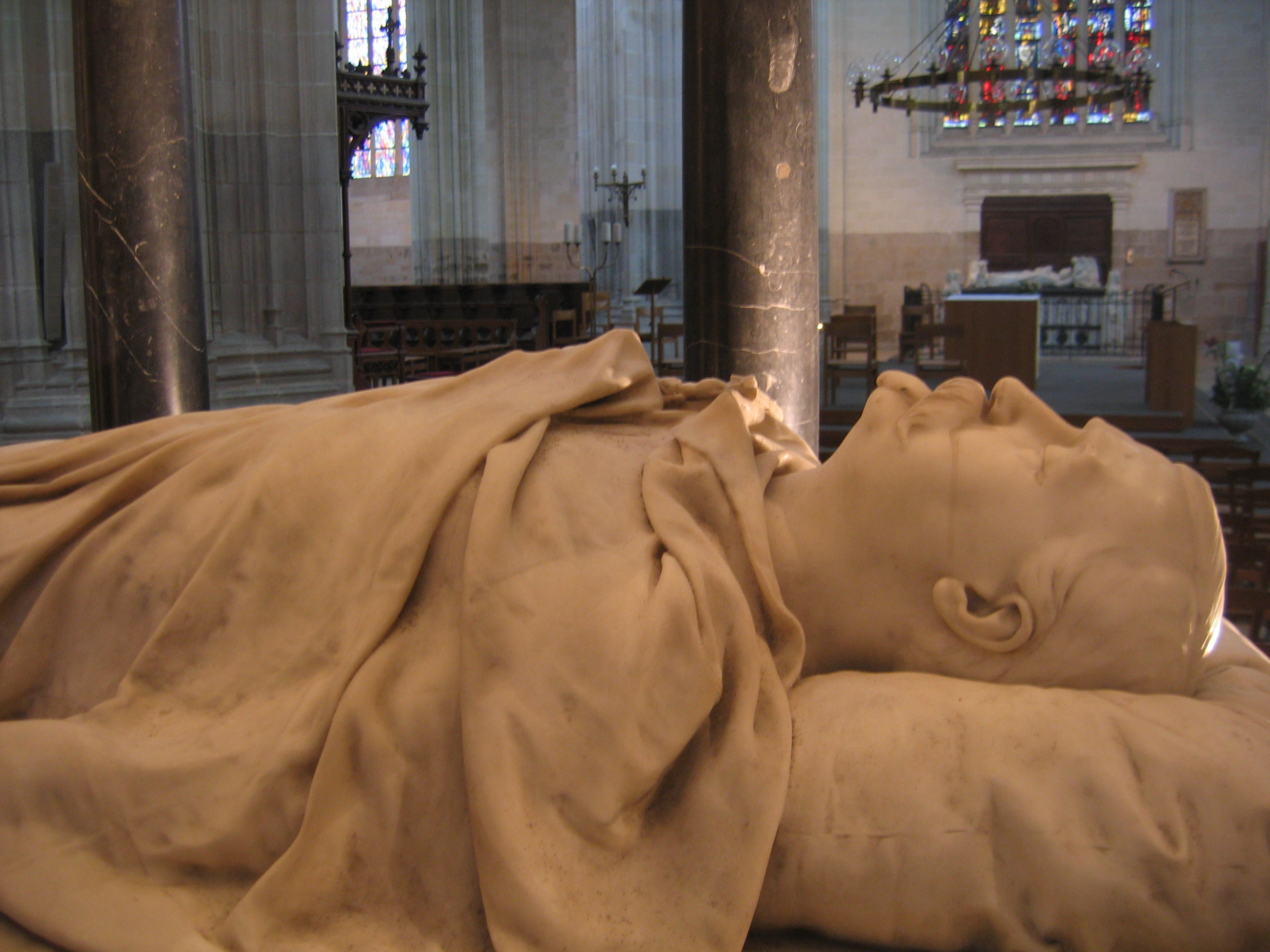 Cénotaphe du général Juchault de La Moricière, cathédrale de Nantes (détail du gisant)